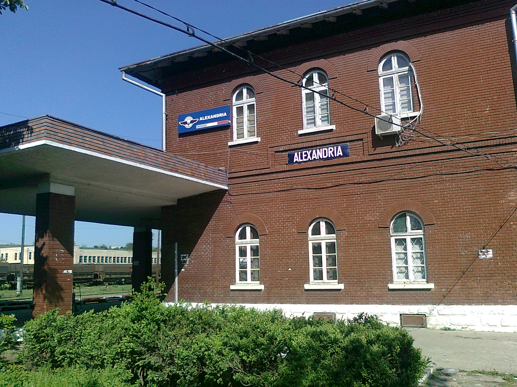 Gara CFR Alexandria, Romania